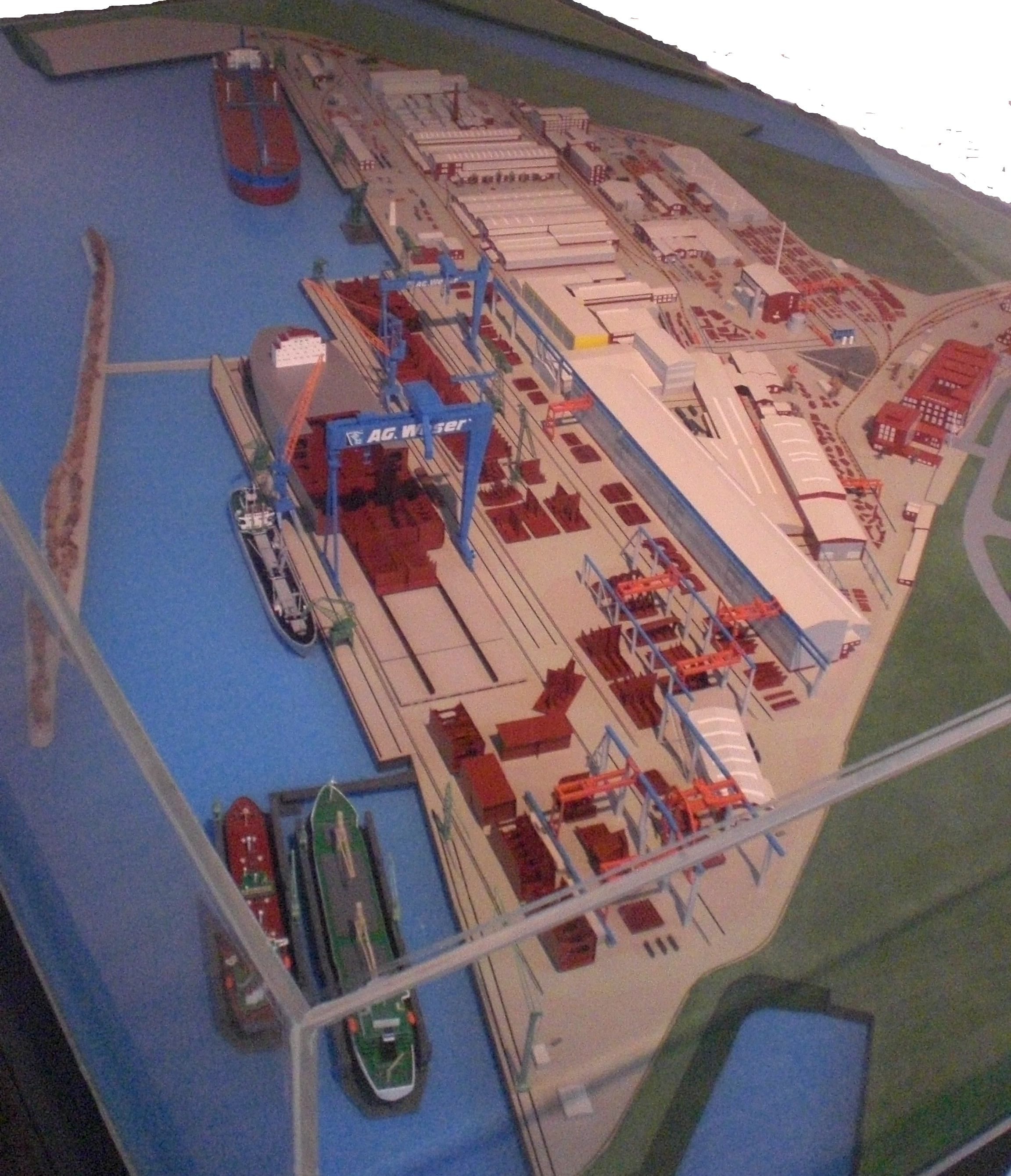 Modell der ehemaligen Bremer Werft AG "Weser" um 1980, mit Werft- und Reparaturhafen, den Helgen "Alfried" und "Wilhelm" mit den Portalkränen und der Schiffbauhalle daneben. Rechts am Rand das Verwaltungs- und Konstruktionsgebäude. Das Modell steht in der ständigen Ausstellung des Focke Museums in Bremen-Schwachhausen. Focke-Museum Native nameFocke-MuseumLocationBremen, GermanyCoordinates53° 05′ 33″ N, 8° 51′ 51″ E Established1918/1959Website